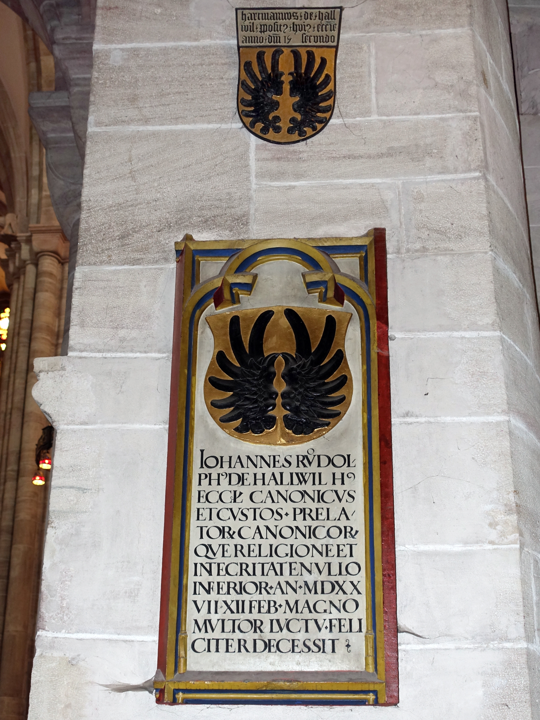 ohann Rudolf von Hallwyl (1460–1527) Dompropst. Epitaph im Basler Münster